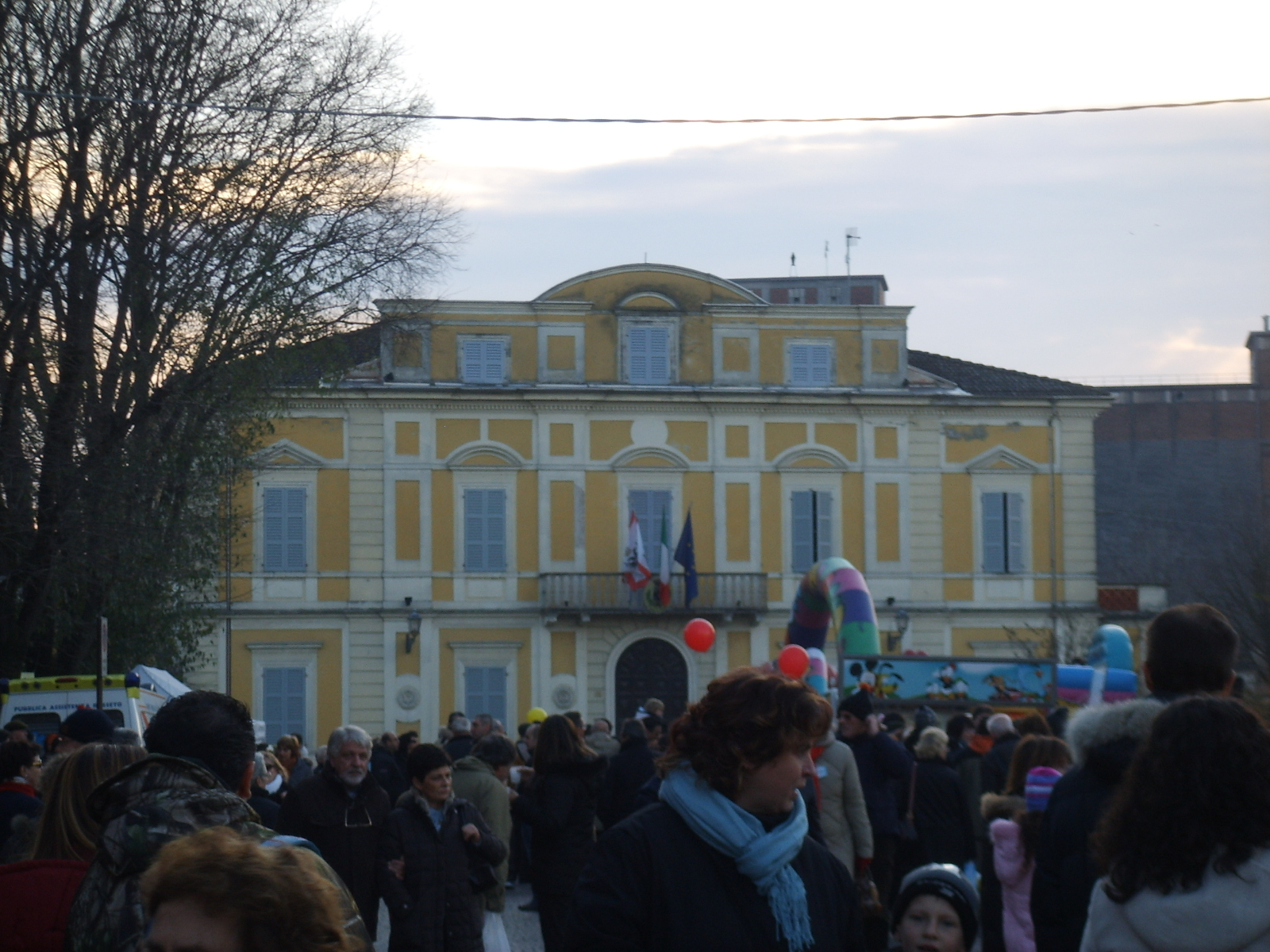 Zibello